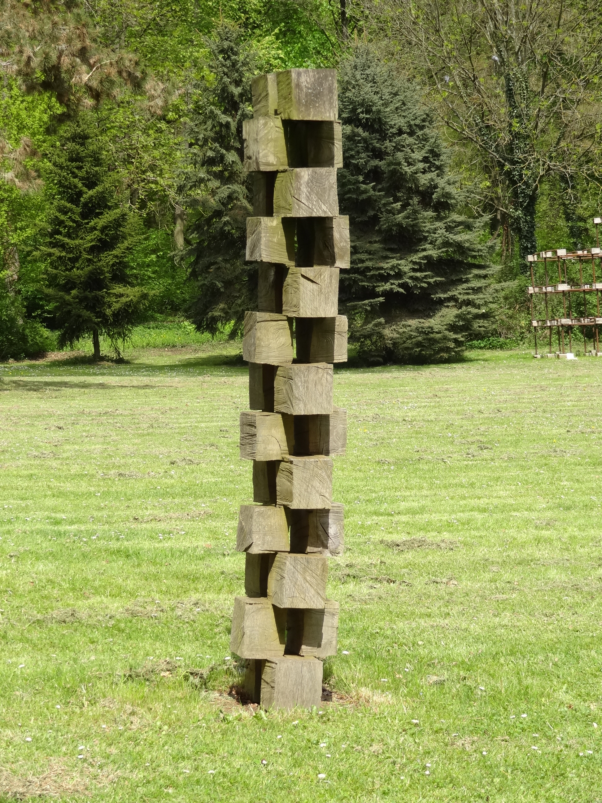 "Quadrat-Würfel", Ortrud Sturm, Eichenholz, Bildhauersymposium 2009, Kurpark Bad Salzhausen